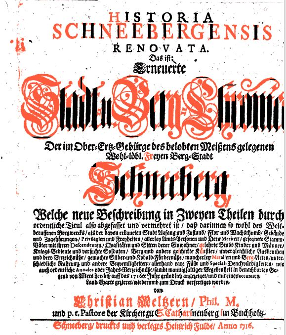 Schneeberg/Erzgebirge: Titelblatt von Christian Meltzer Historia Schneebergensis renovata, das ist: Erneuerte Stadt- und Berg-Chronick der im Ober-Ertz-Gebürge des belobten Meißens gelegenen Wohl-löbl. Freyen Berg-Stadt Schneeberg …, druckts und verlegts Heinrich Fulde, Schneeberg 1716 Digitalisat